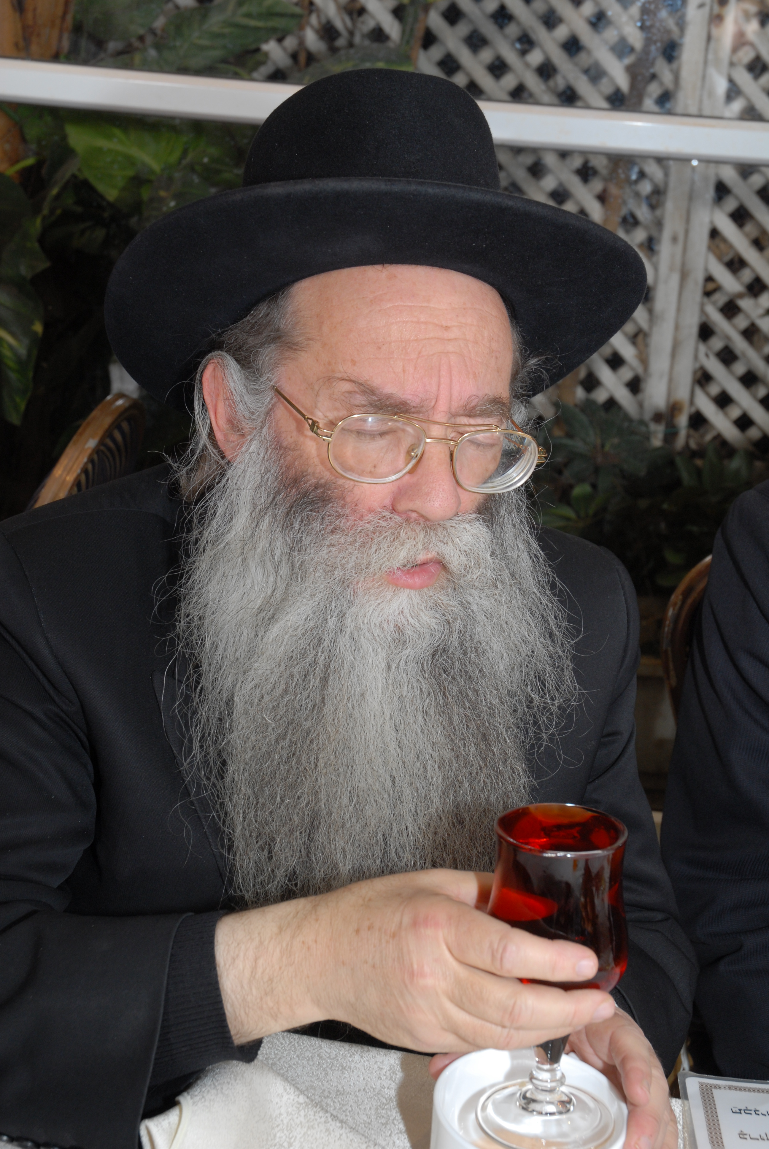 הרב צבי רוטברג